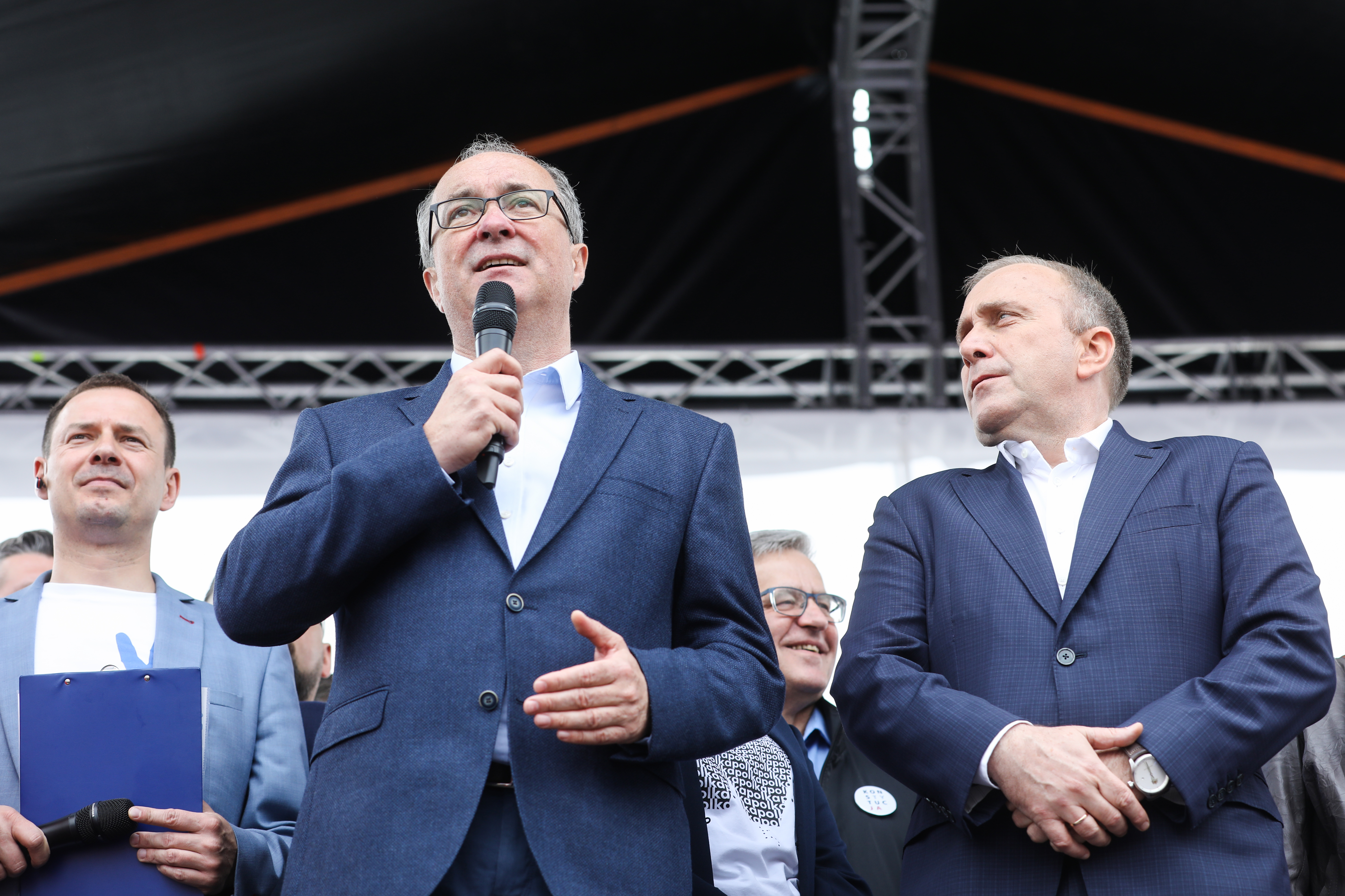 Włodzimierz Czarzasty i Grzegorz Schetyna, marsz Polska w Europie.